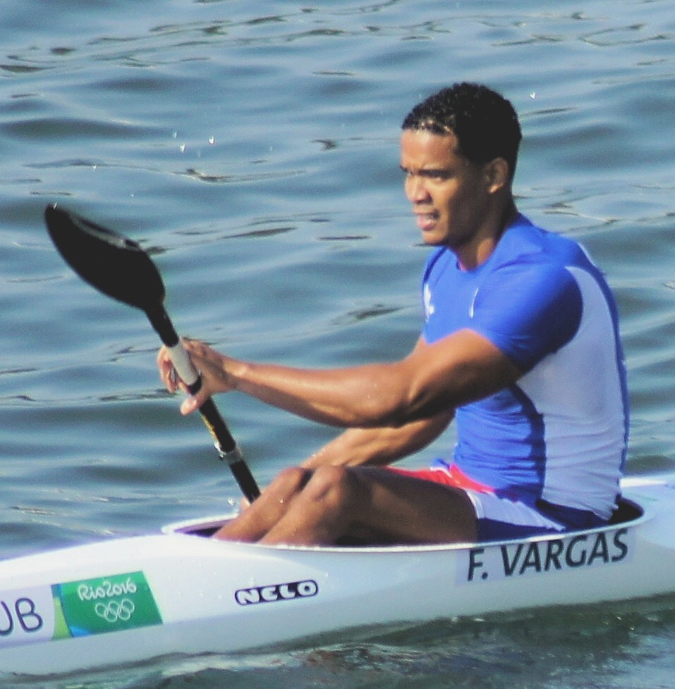 Rio 2016. Canoagem de velocidade/Canoe sprint